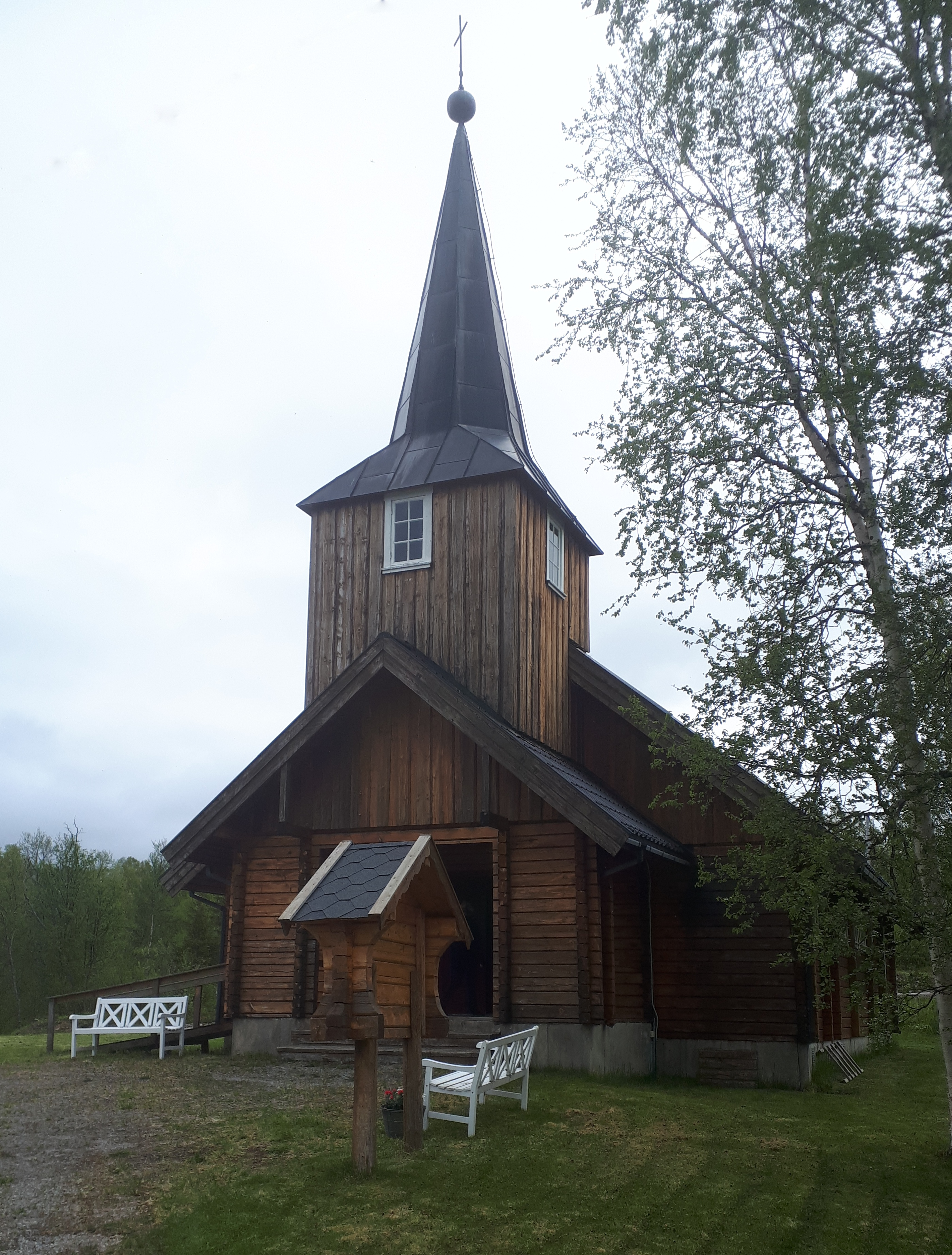 Kapellet i Varntresk